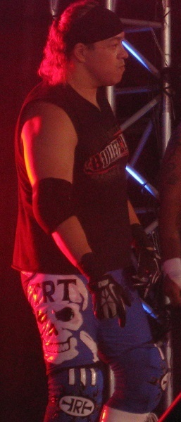 9月29日 神戸大会 「DESTRUCTION」 BULLET CLUB入場 Cropped from File:BULLET CLUB.JPG.